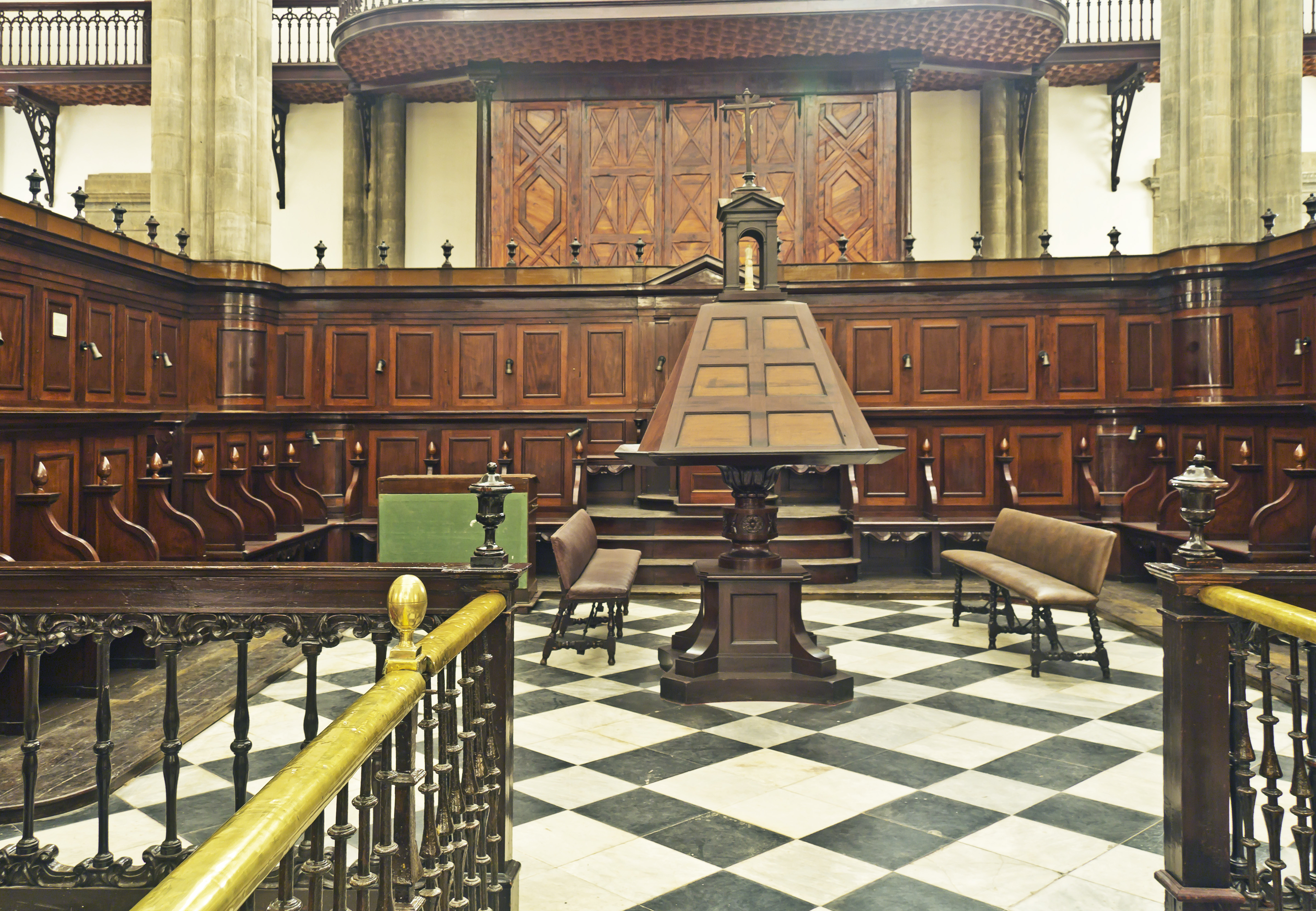 Chor der Kathedrale in La Laguna